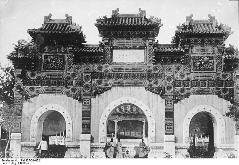 Eingang zum Konfuzius-Tempel in Peking